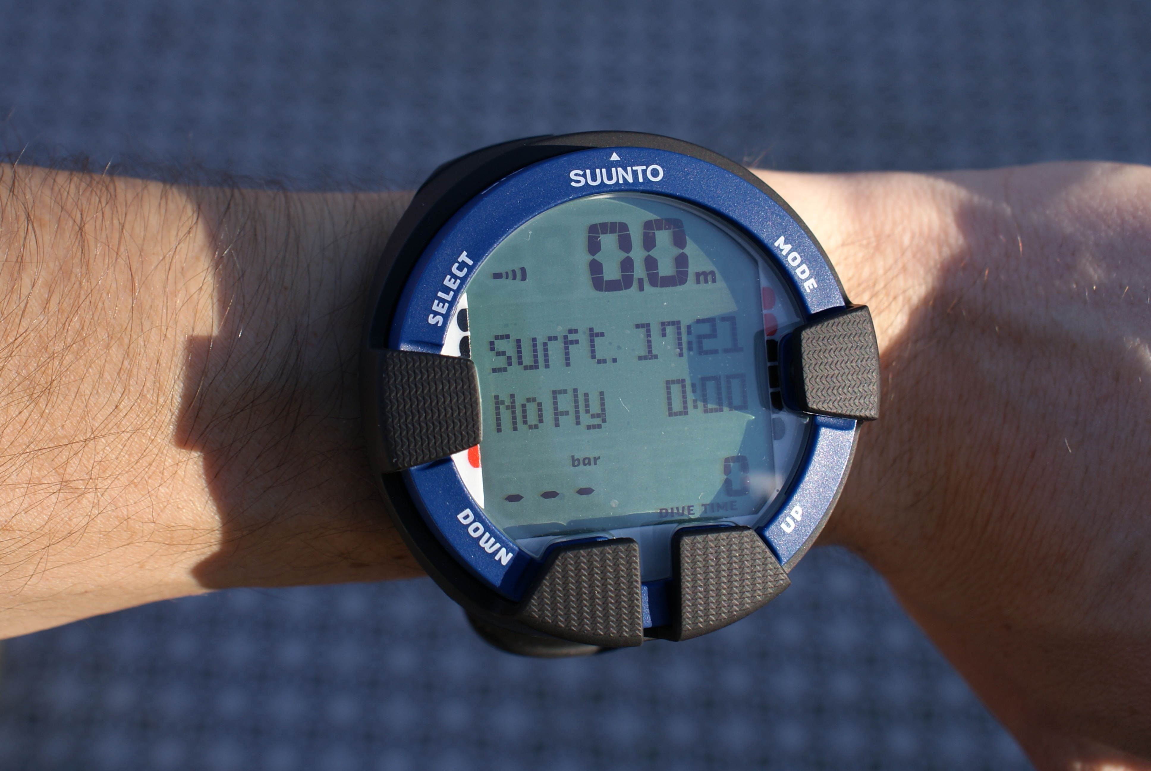 Tauchcomputer Suunto Vyper Air (am Arm)